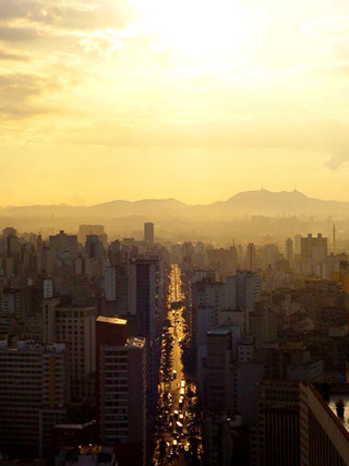 Eixo da Avenida Sao Joao em Sao Paulo